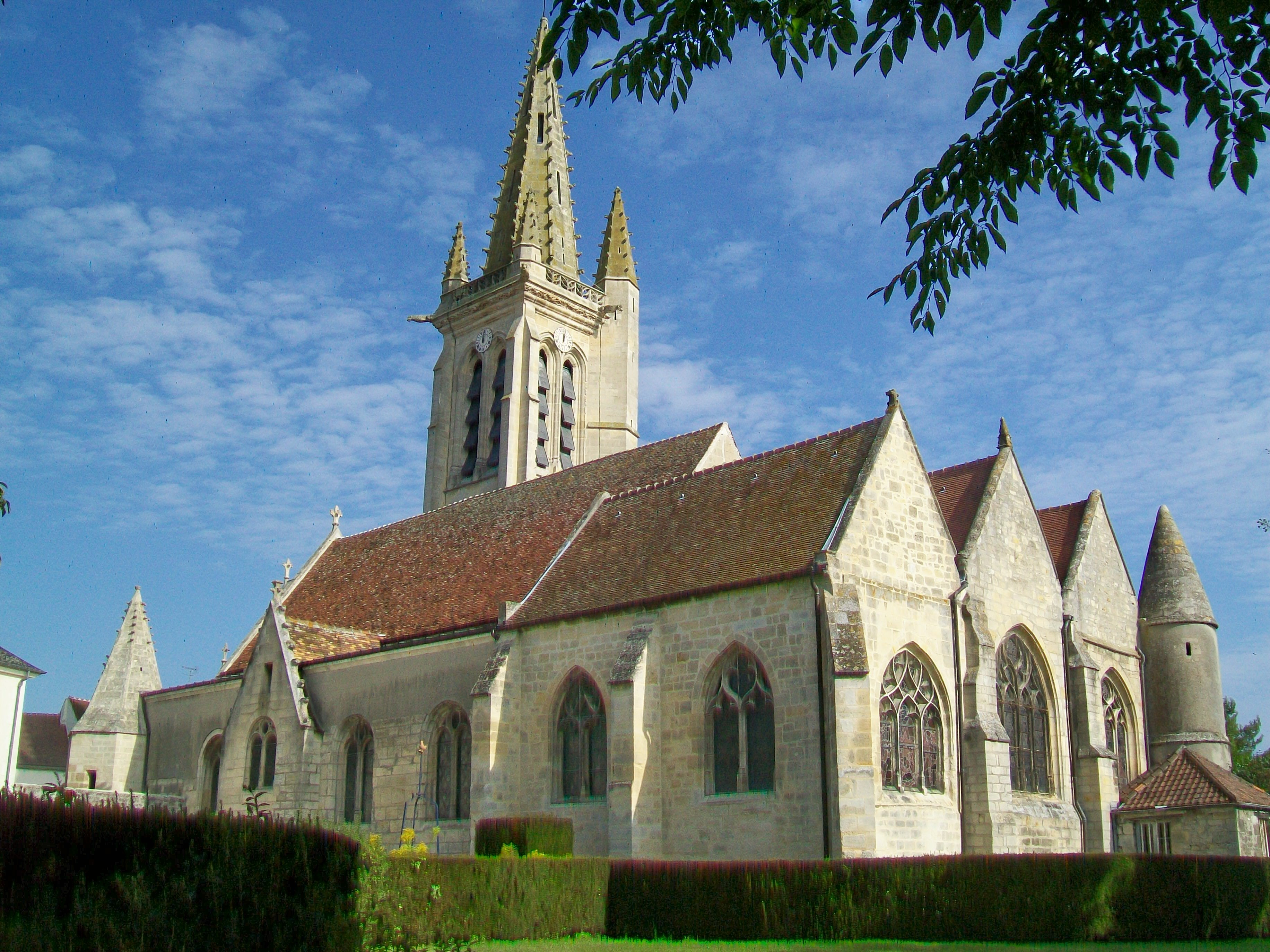 Vue d'ensemble de l'église depuis l'est (jardin de l'ancien presbytère).